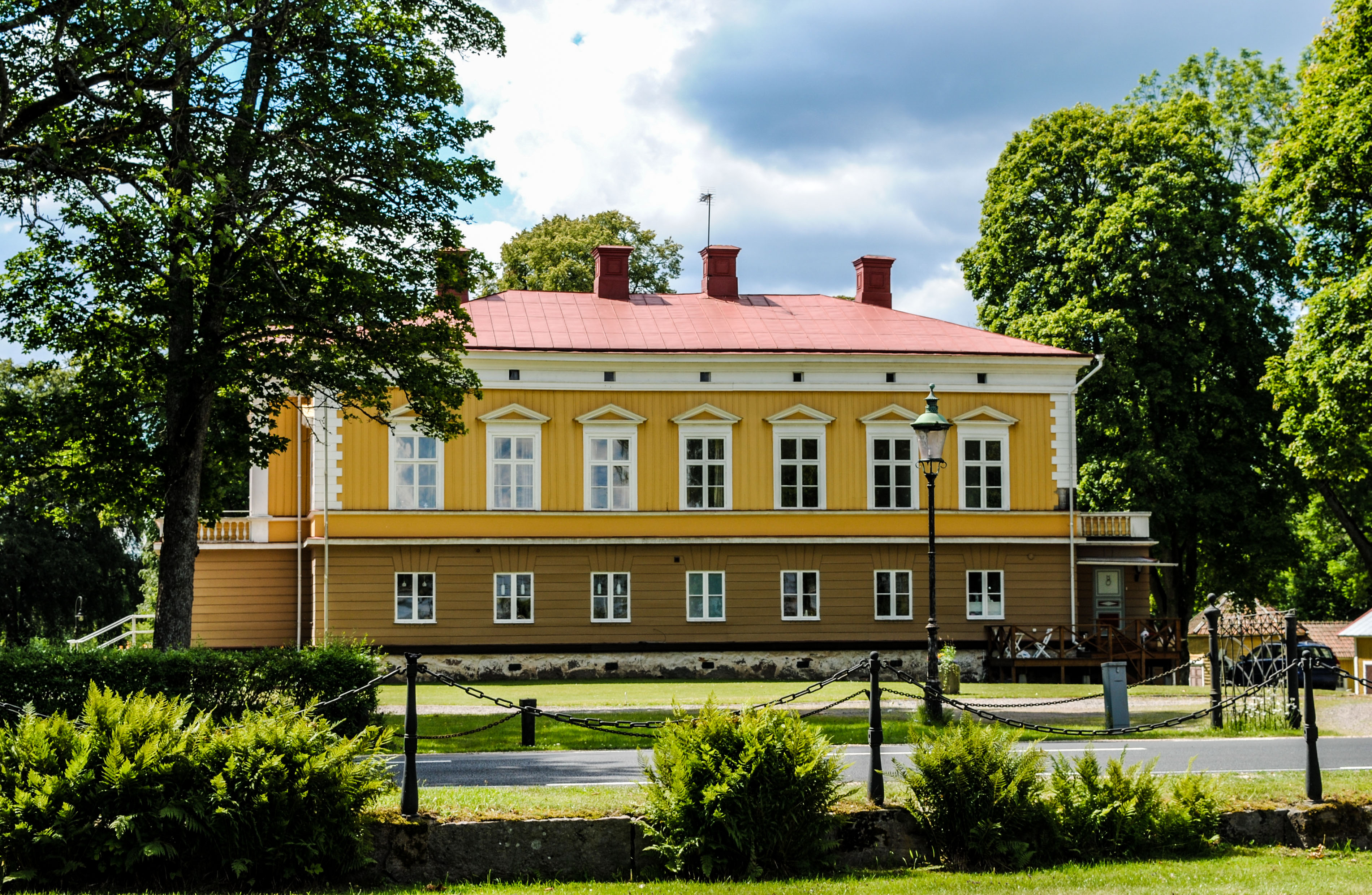 Klavreström. Herrgården